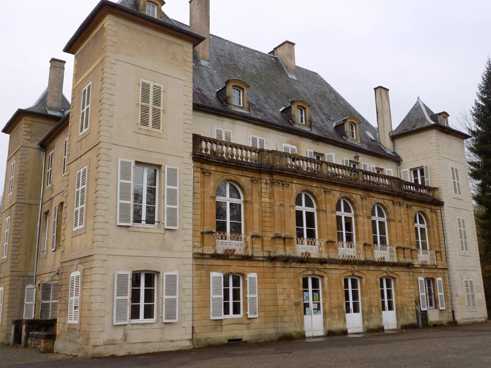 Le château avant les travaux de rénobations